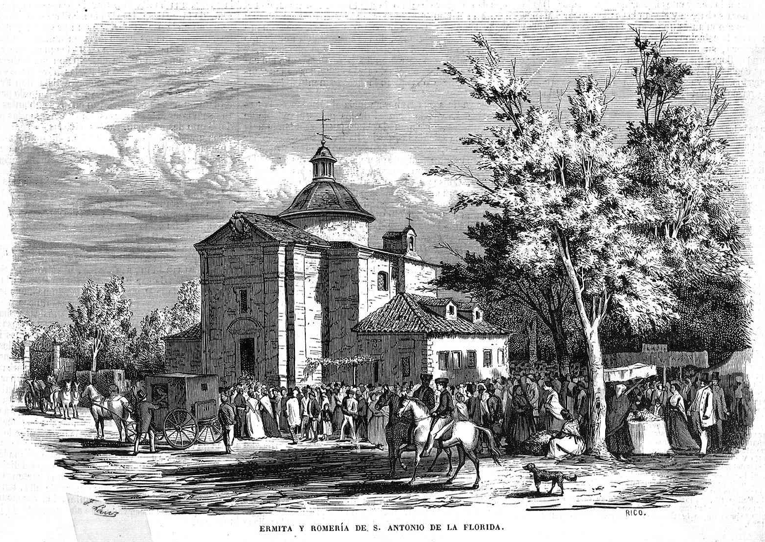 Ermita y romería de San Antonio de la Florida, en la revista española El Museo Universal.